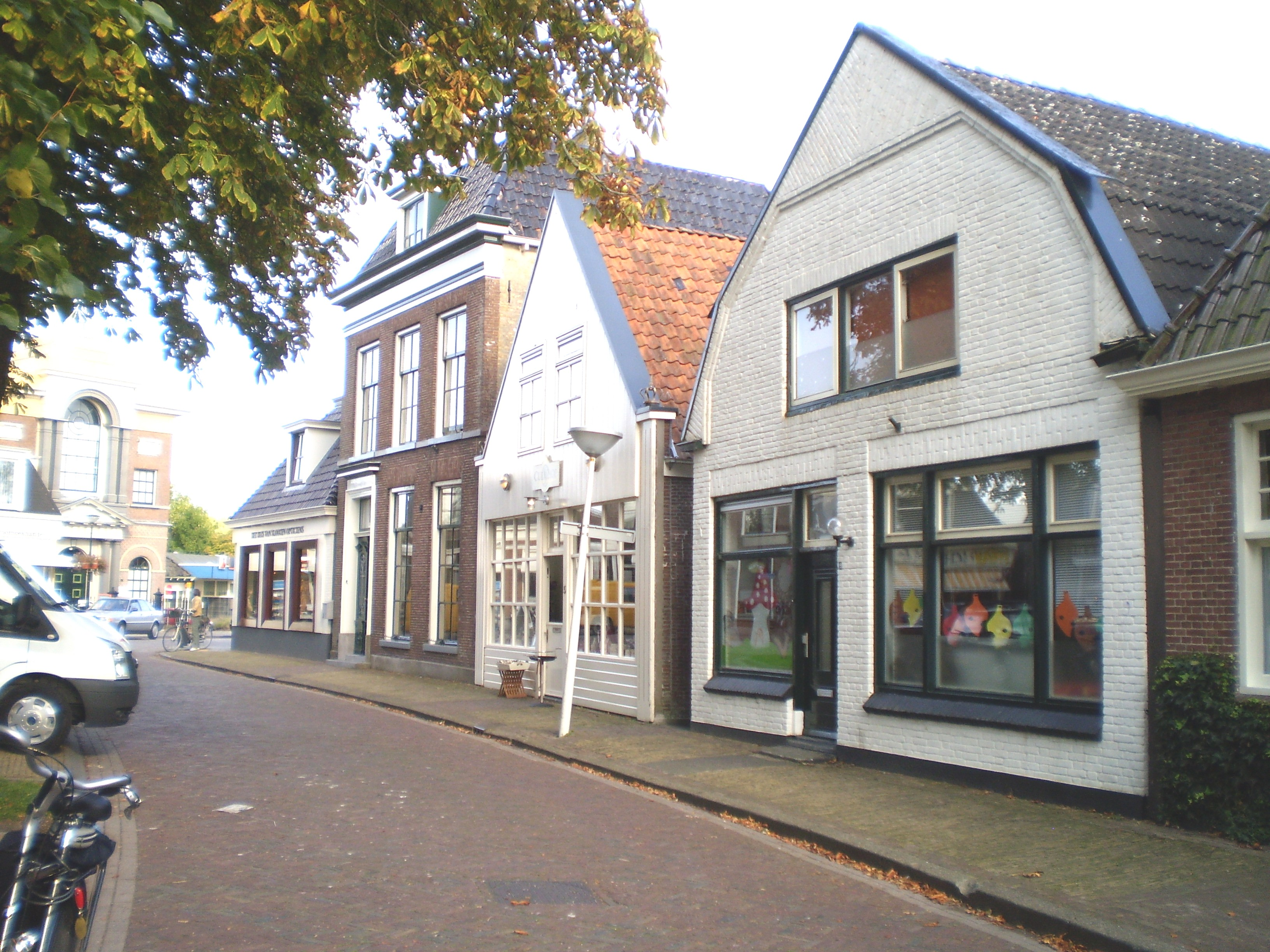 Dringelstrjitte, Akkrum.